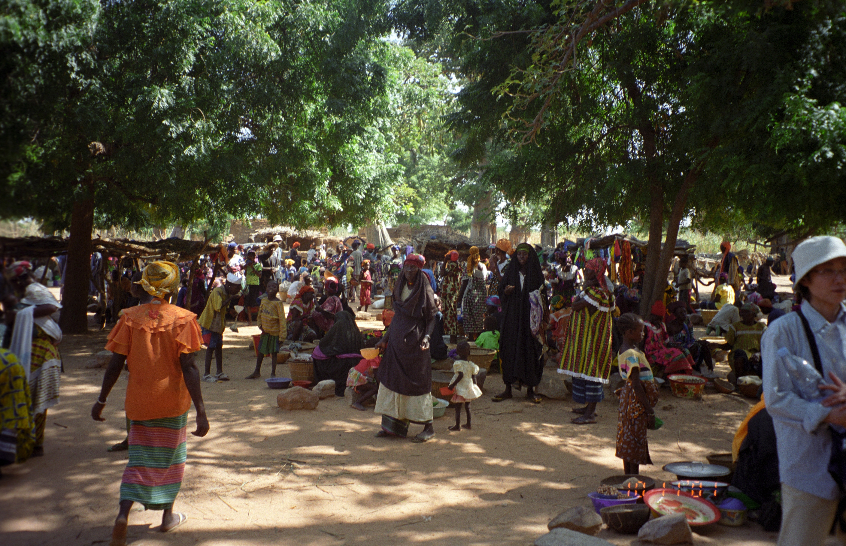 Kani-Kombole, Mali